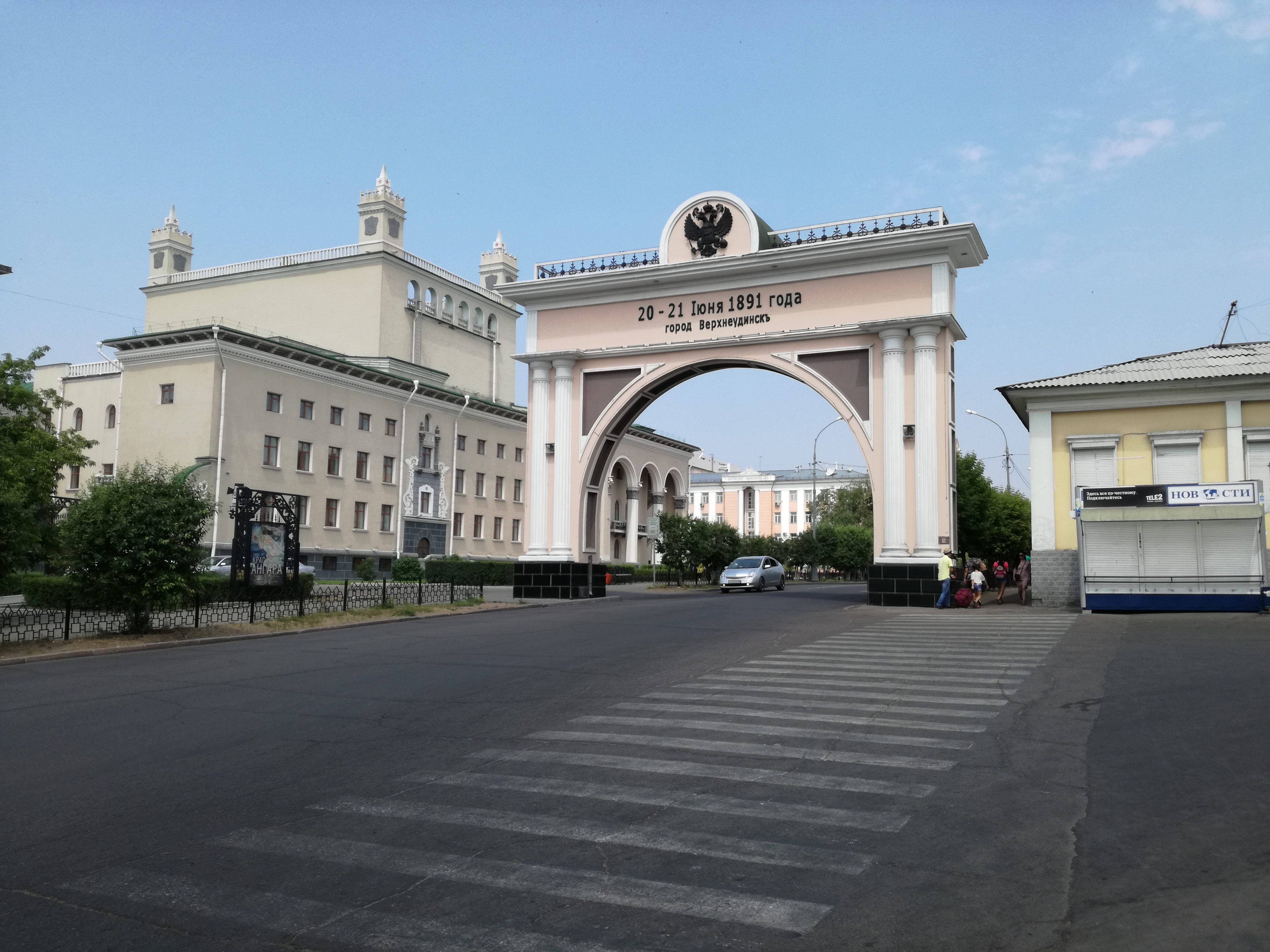 Улан Удэ